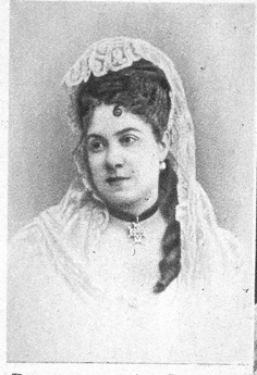 Elisa Volpini (1835-?)